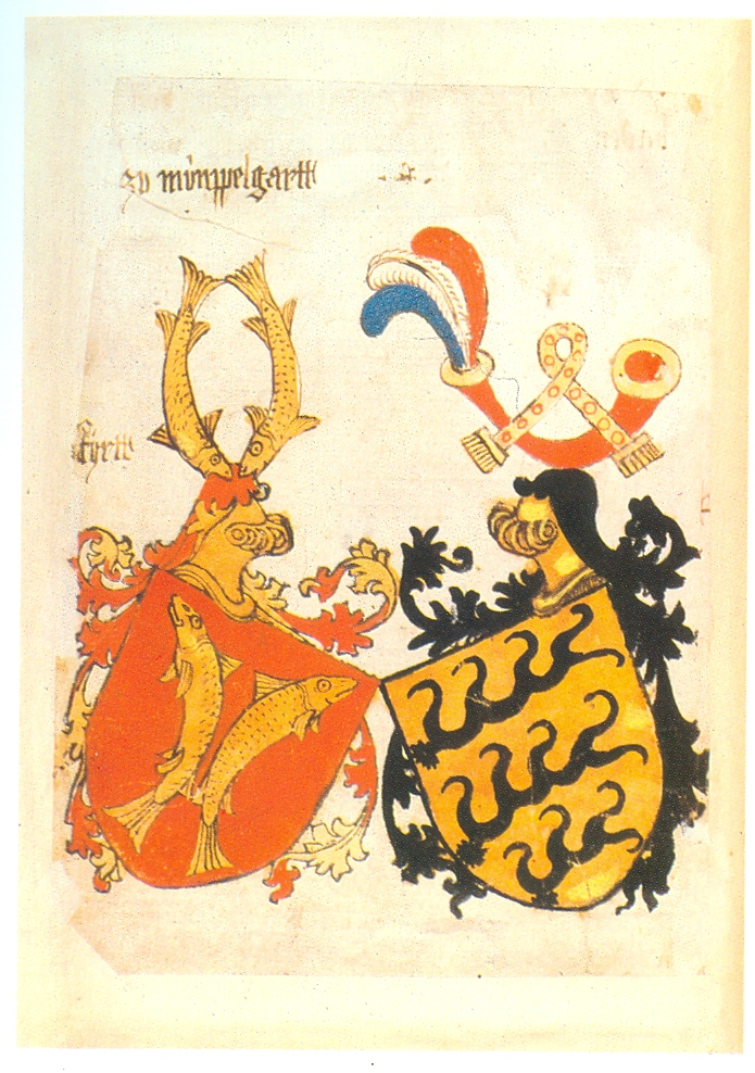 Ingeram-Codex der ehemaligen Bibliothek Cotta zu münppelgartt Ffyrtt